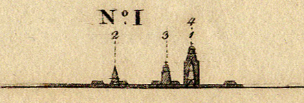 Ansicht No 1 vom Signalschiff. Ausschnnitt der Legende auf der Karte der Deutschen Bucht von E.W. Schuback (1831), siehe auch [1]